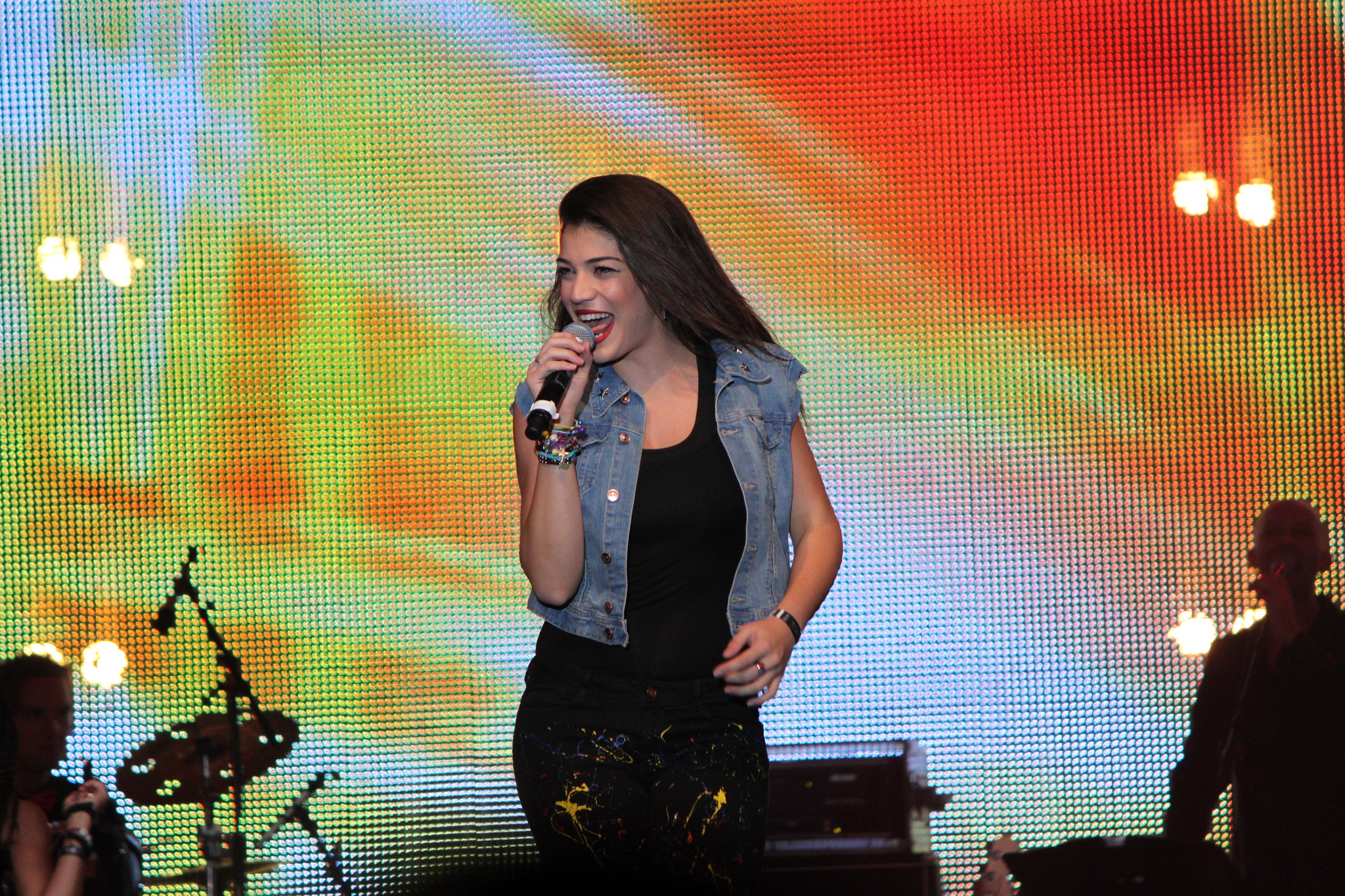 La cantante chipriota Ivi Adamou en el Stockholm Pride 2012.